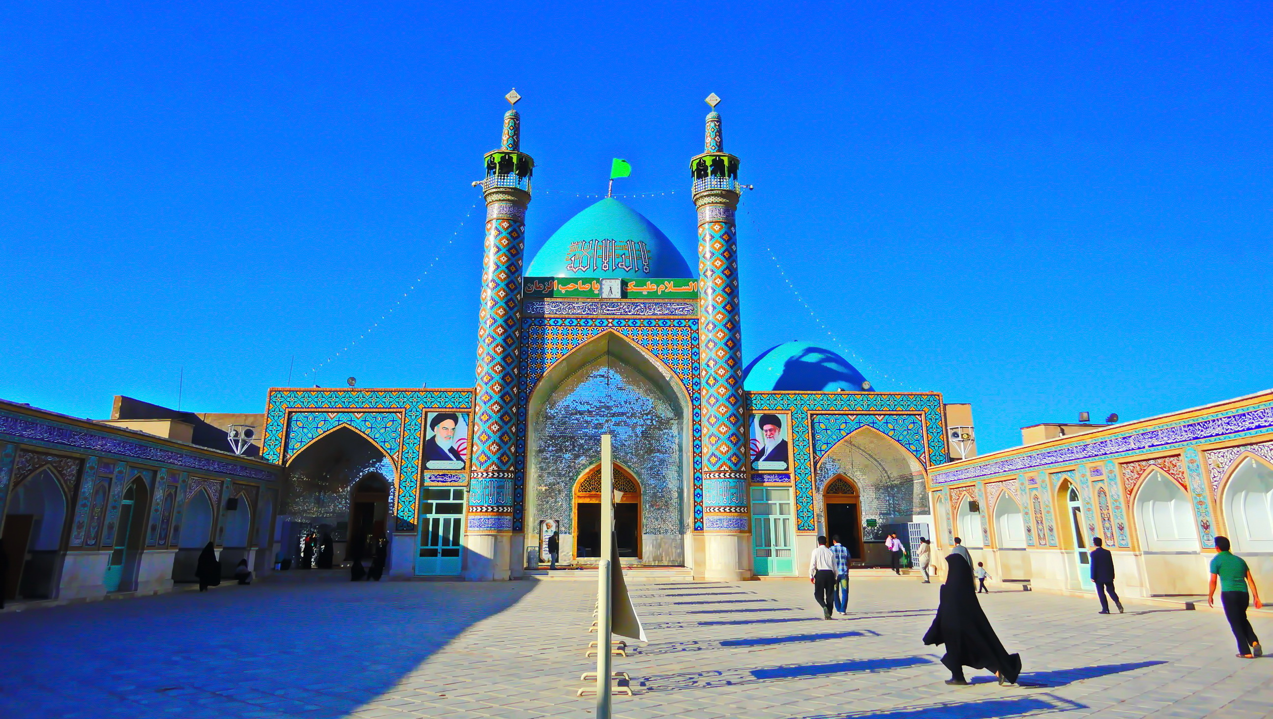 Al-Hamza Mosque - Kashmar